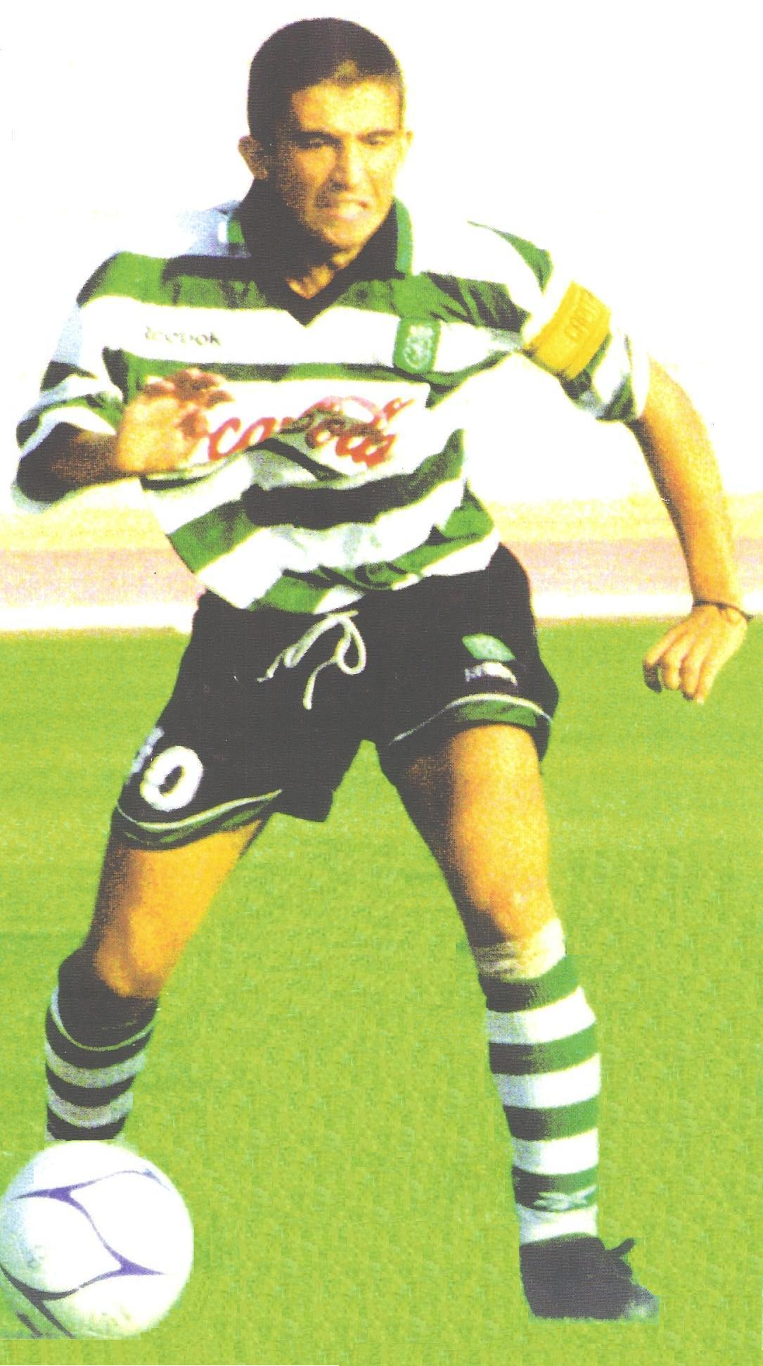 Carlos Marques